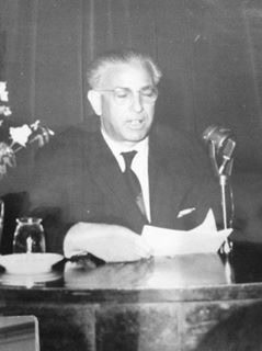 الباحث والمؤرخ الأستاذ عبد القادر العياش من مدينة دير الزور